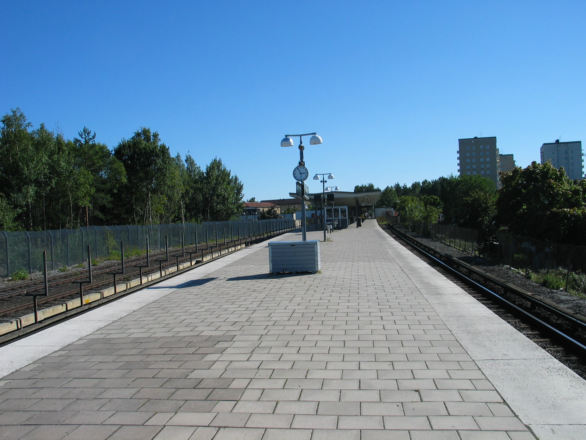 Fruängen, a metro station in Stockholm, Sweden.